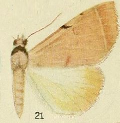 21-(Ctenusa rectilinea psamatha) Ctenusa curvilinea Hampson, 1913